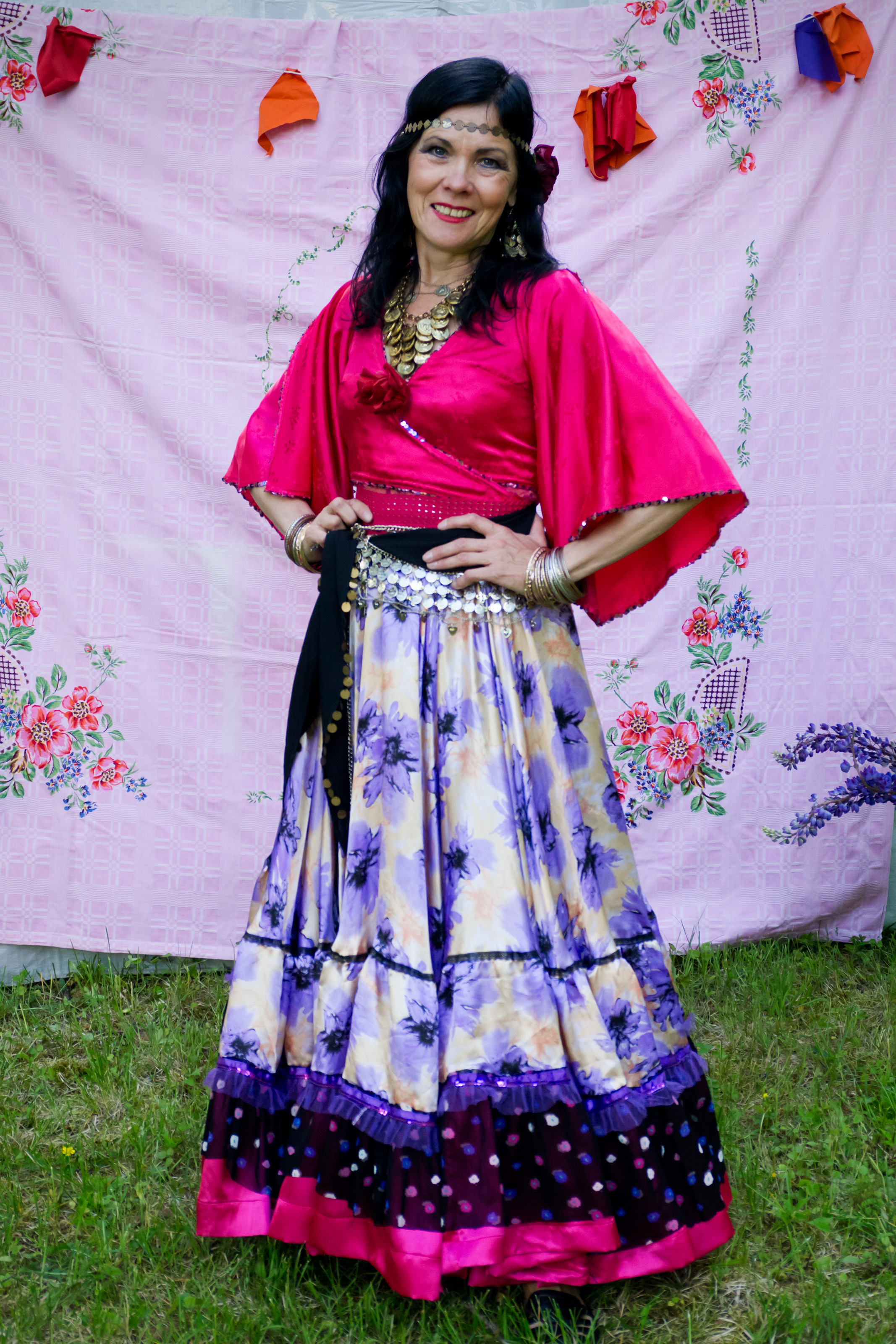 Svetlana Zaikova mustlastantsuansambel Maljarka sünnipäevakontserdil 4. juunil 2016